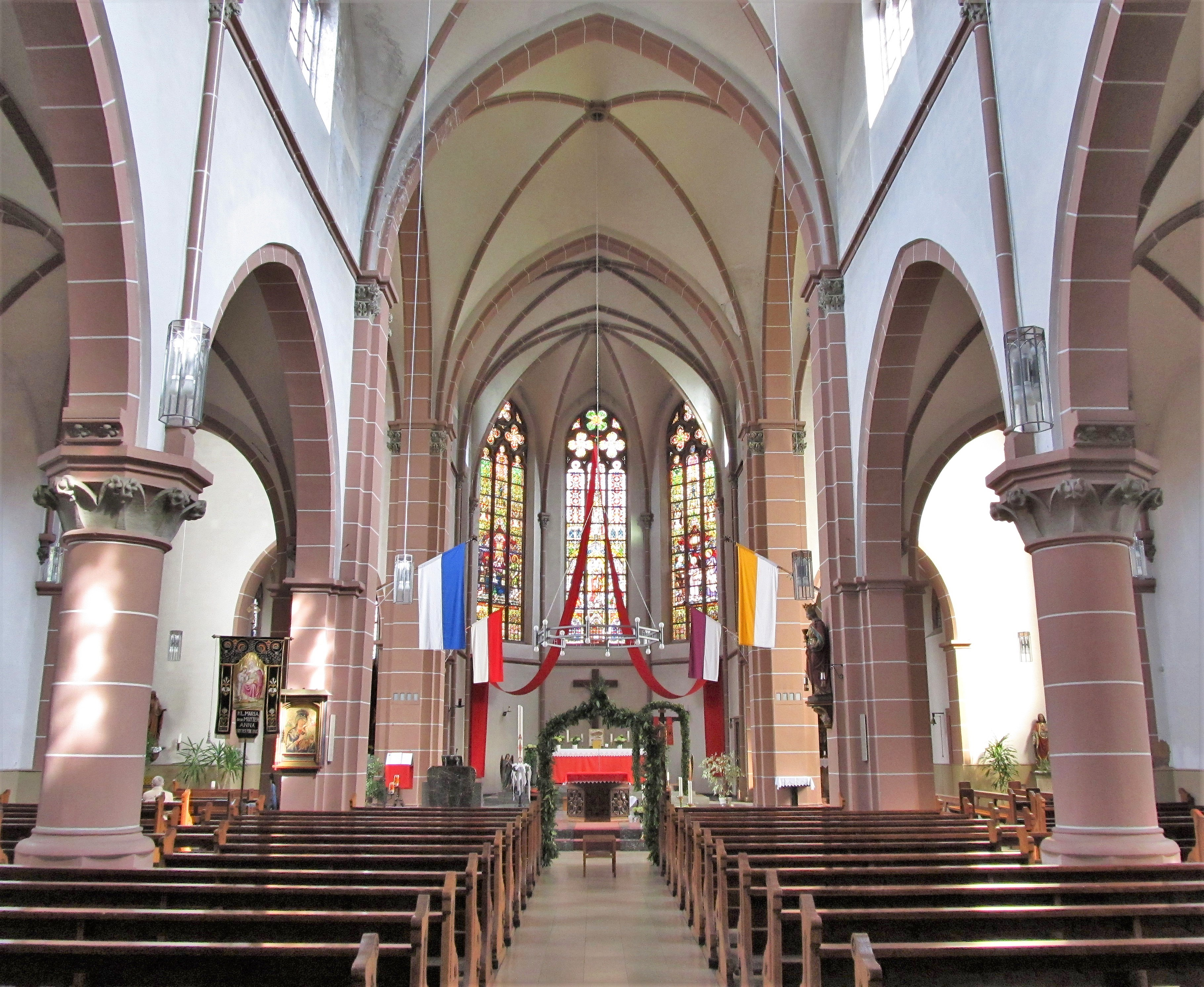 Blick ins Innere der katholischen Pfarrkirche Herz Jesu in Landsweiler-Reden, einem Ortsteil der Gemeinde Schiffweiler, Landkreis Neunkirchen, Saarland